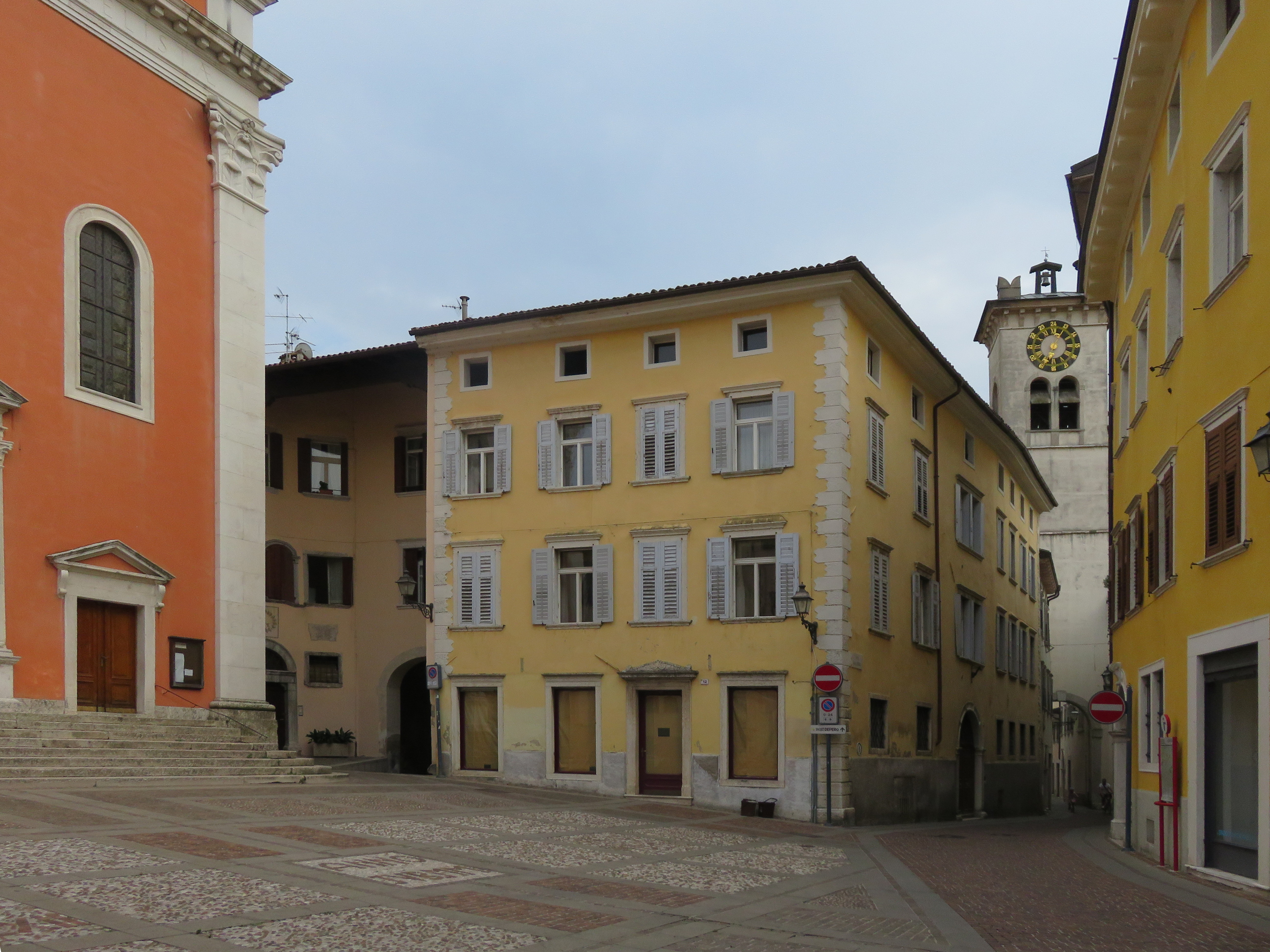 A sinistra la Chiesa arcipretale di San Marco, subito alla sua destra il vicolo con la casa che fu sede del Ginnasio, della Biblioteca Comunale e dell'Accedemia degli Agiati. A destra Via della Terra, con la Torre Civica e, visibile sotto il volto, la casa dove visse Tartarotti.